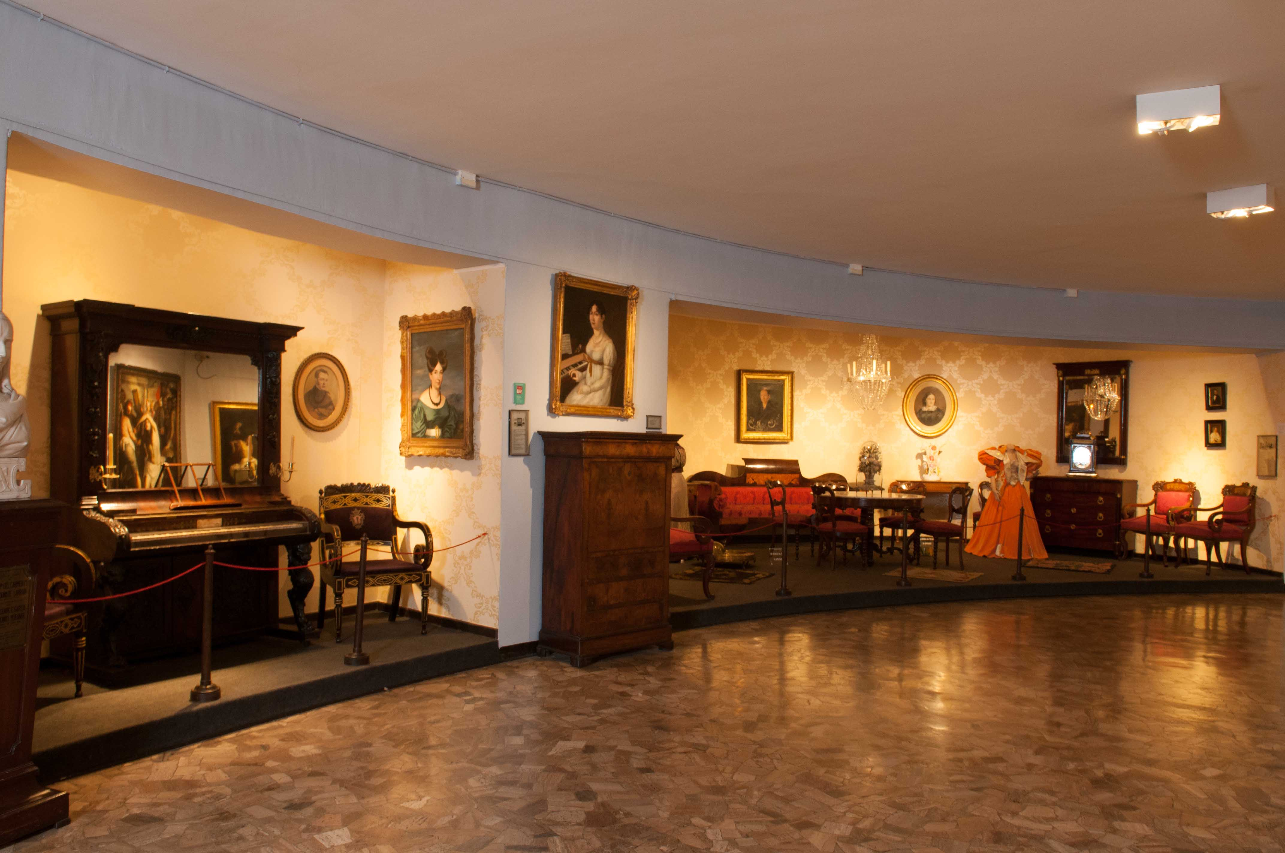 Salones con objetos pertenecientes a la época colonial y republicana de Chile y Perú